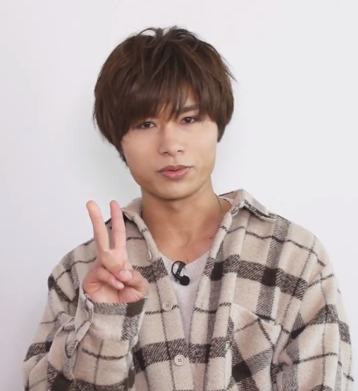 深町寿成（声優）